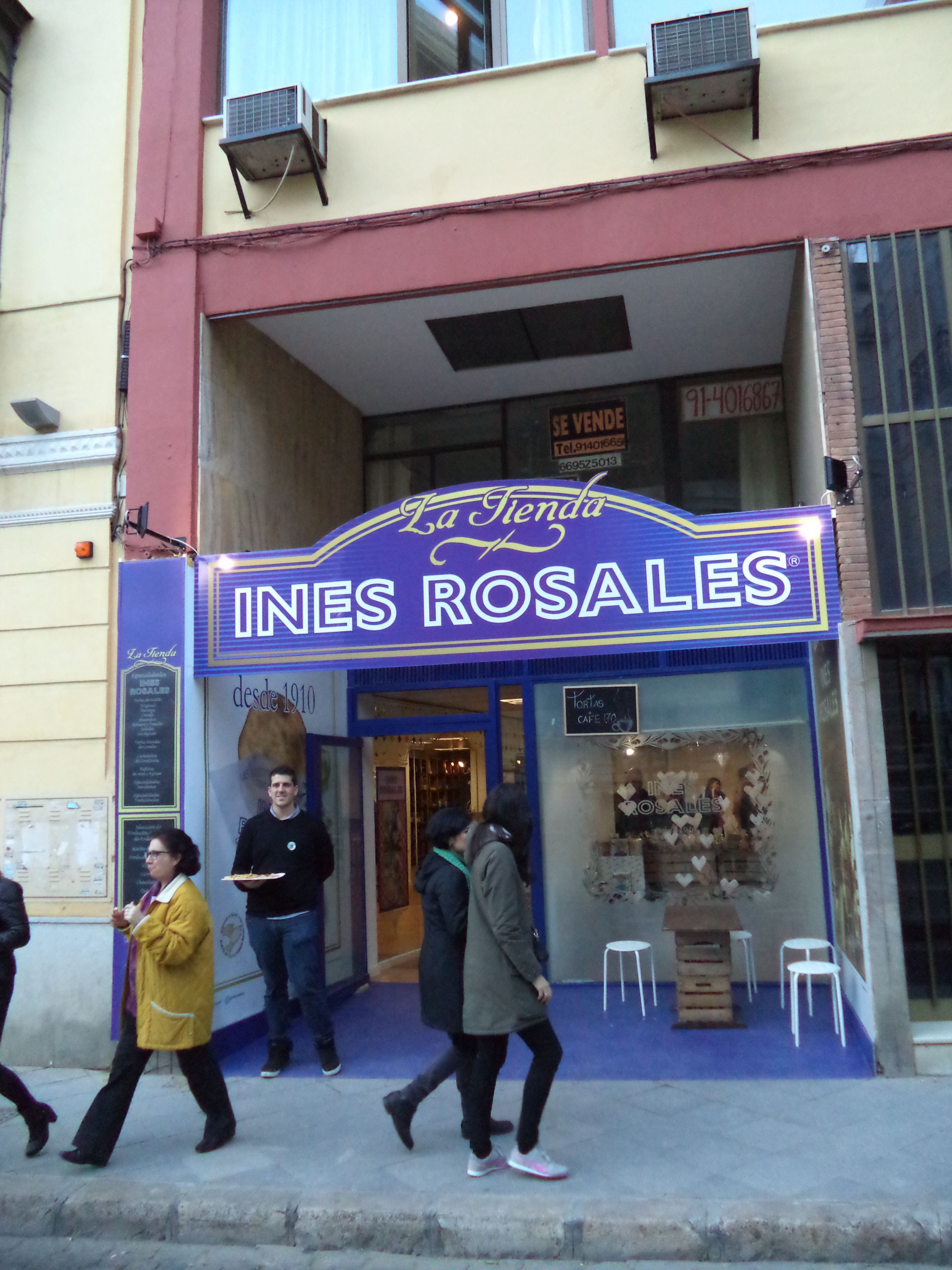 Tienda de la empresa de dulces Inés Rosales en la plaza de San Francisco de Sevilla